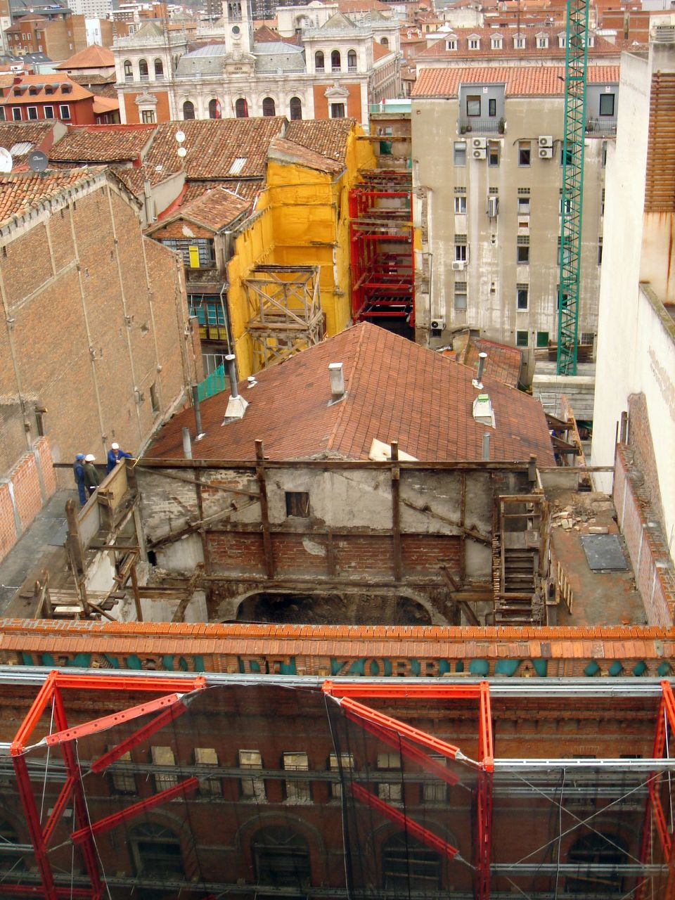 Teatro Zorrilla. En reforma.